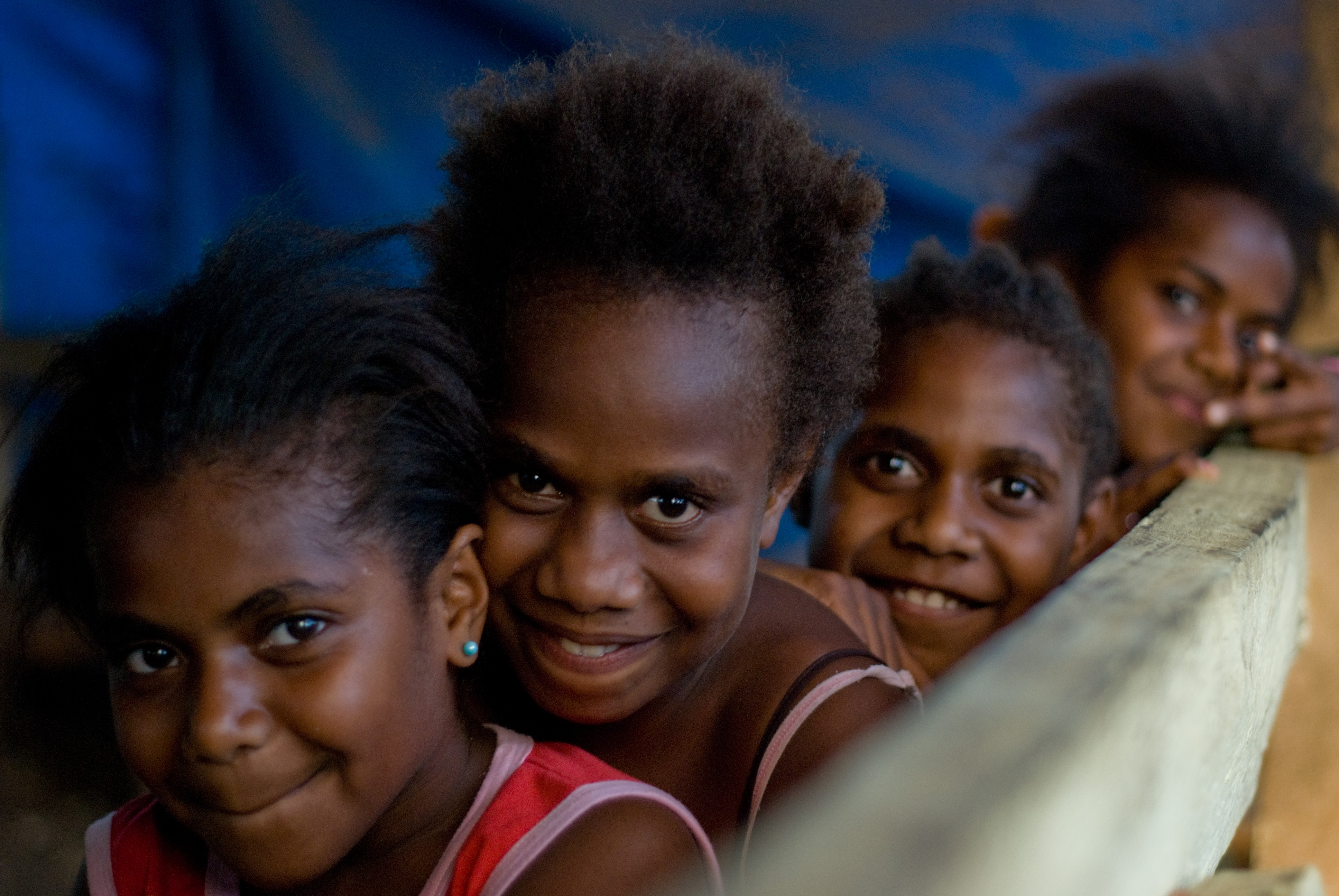 Girls